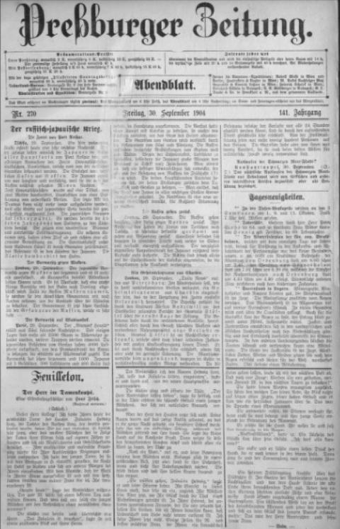 Titulný list bratislavských Pressburger Zeitung z r. 1904.